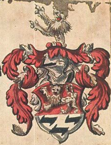 Coat of arms Alemann